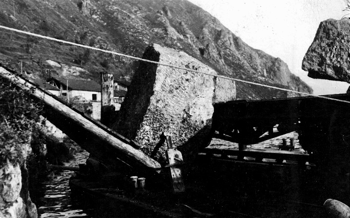 I blocchi di Ceppo di Gré venivano lizzati sulle chiatte, dirette al terminale ferroviario Paratico (BS)